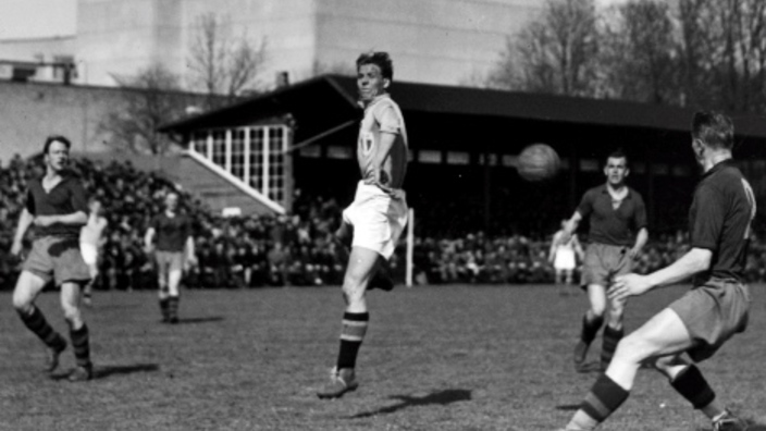 Gustaf Nilsson Malmö FF i en allsvensk match mot Hälsingborgs IF den 15 april 1945. Resultat: MFF - HIF 2-0.